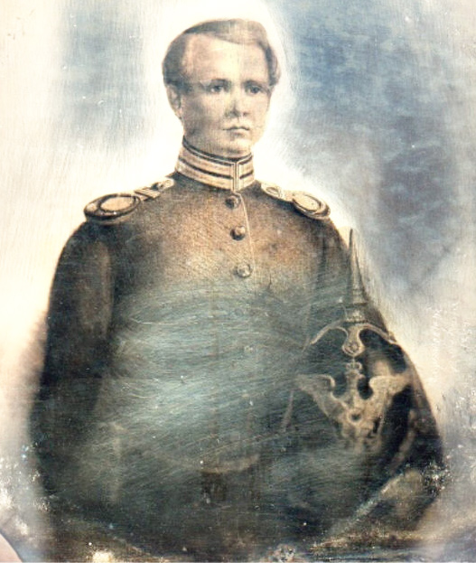 Daguerrotypie des Seconde-Lieutenants Bernard de Gélieu im Garde-Schützen-Bataillon